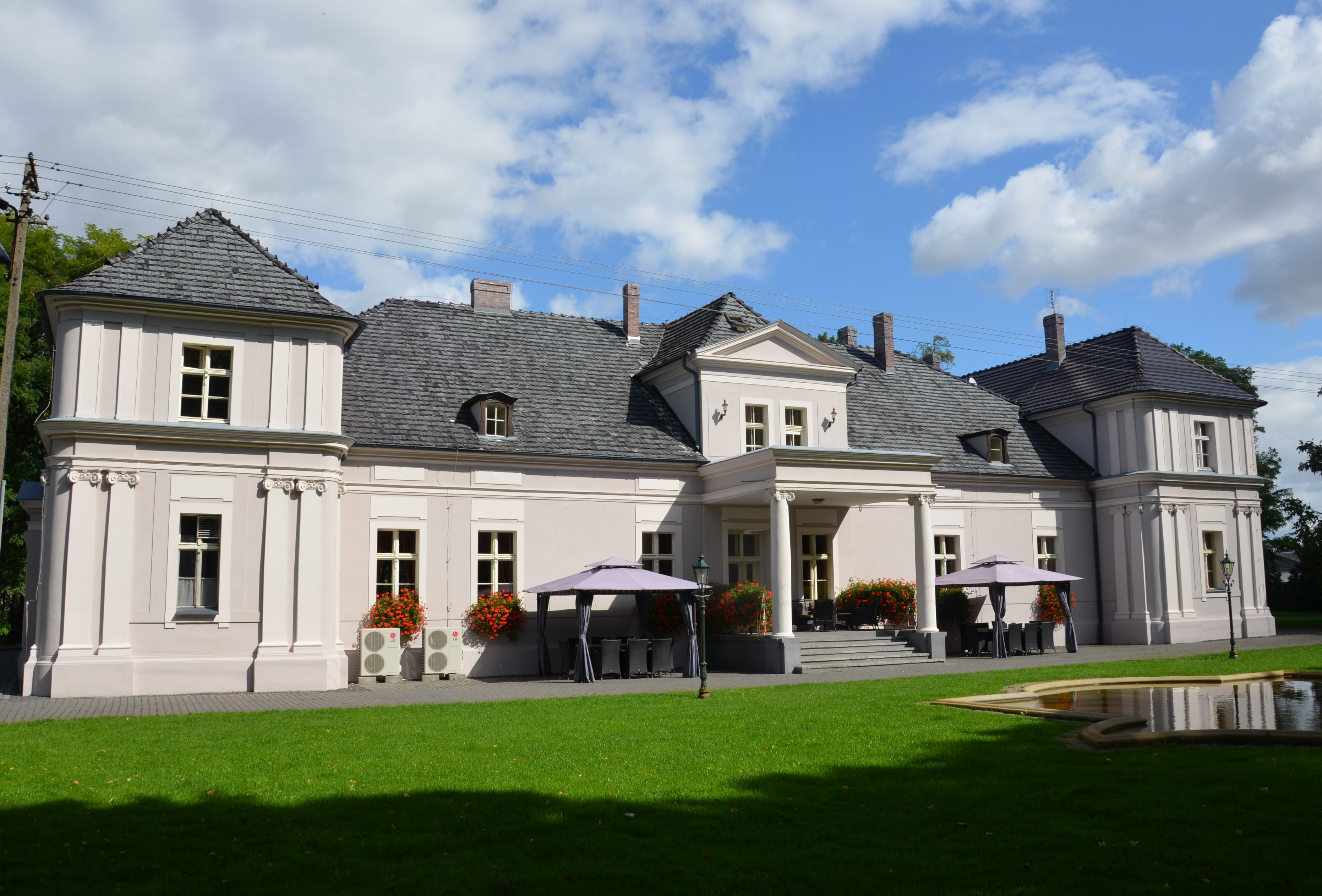 Dakowy Mokre, dwór, 2 poł. XIX, 1912/13